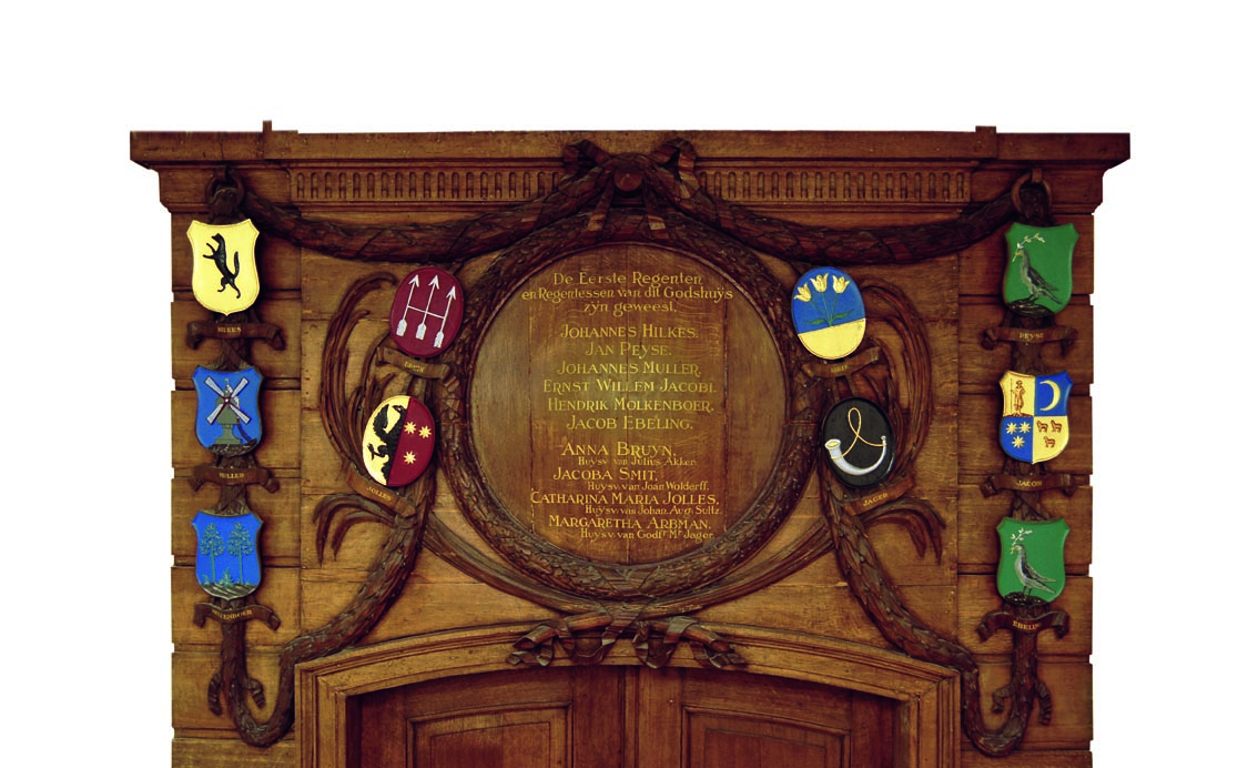 Poort naar het bestuurscentrum van het ELOMVH, opgericht ter ere van de eerste regenten, 1772